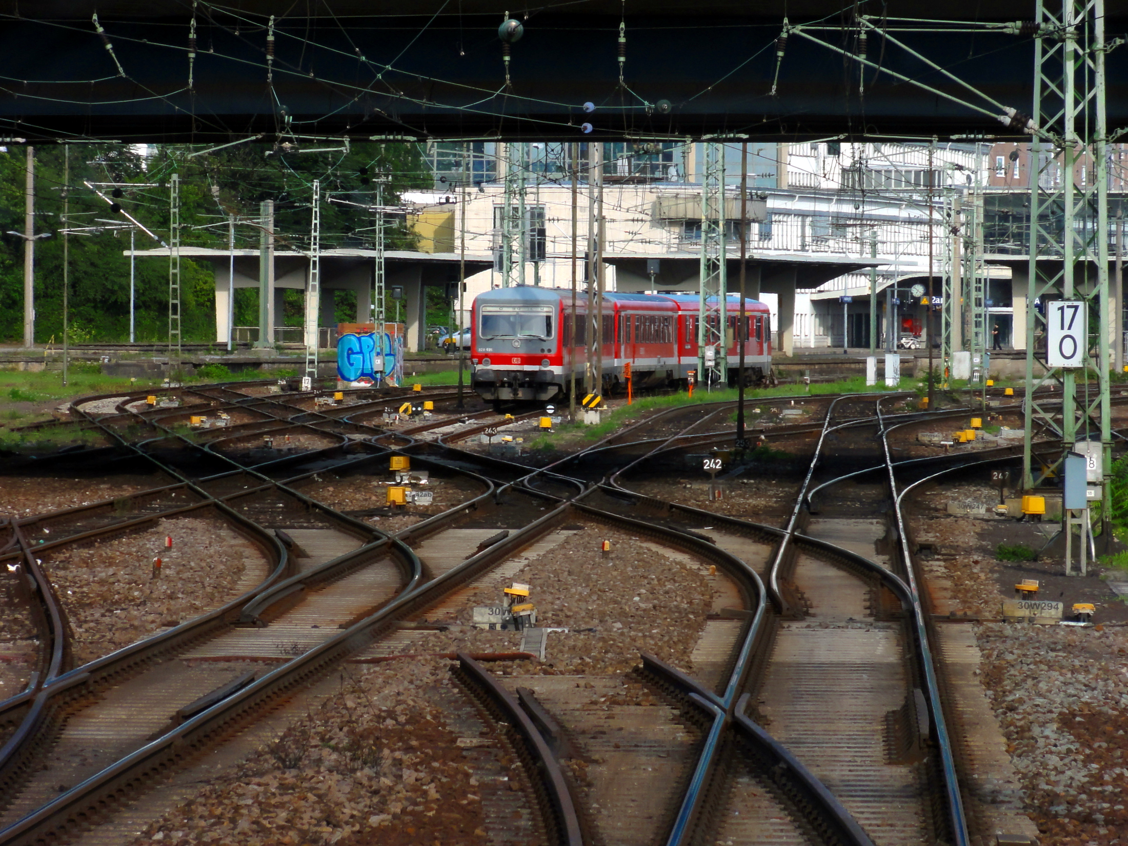 Einfahrt nach Heidelberg Hbf, Zusammentreffen der Strecken 4000 und 4100.